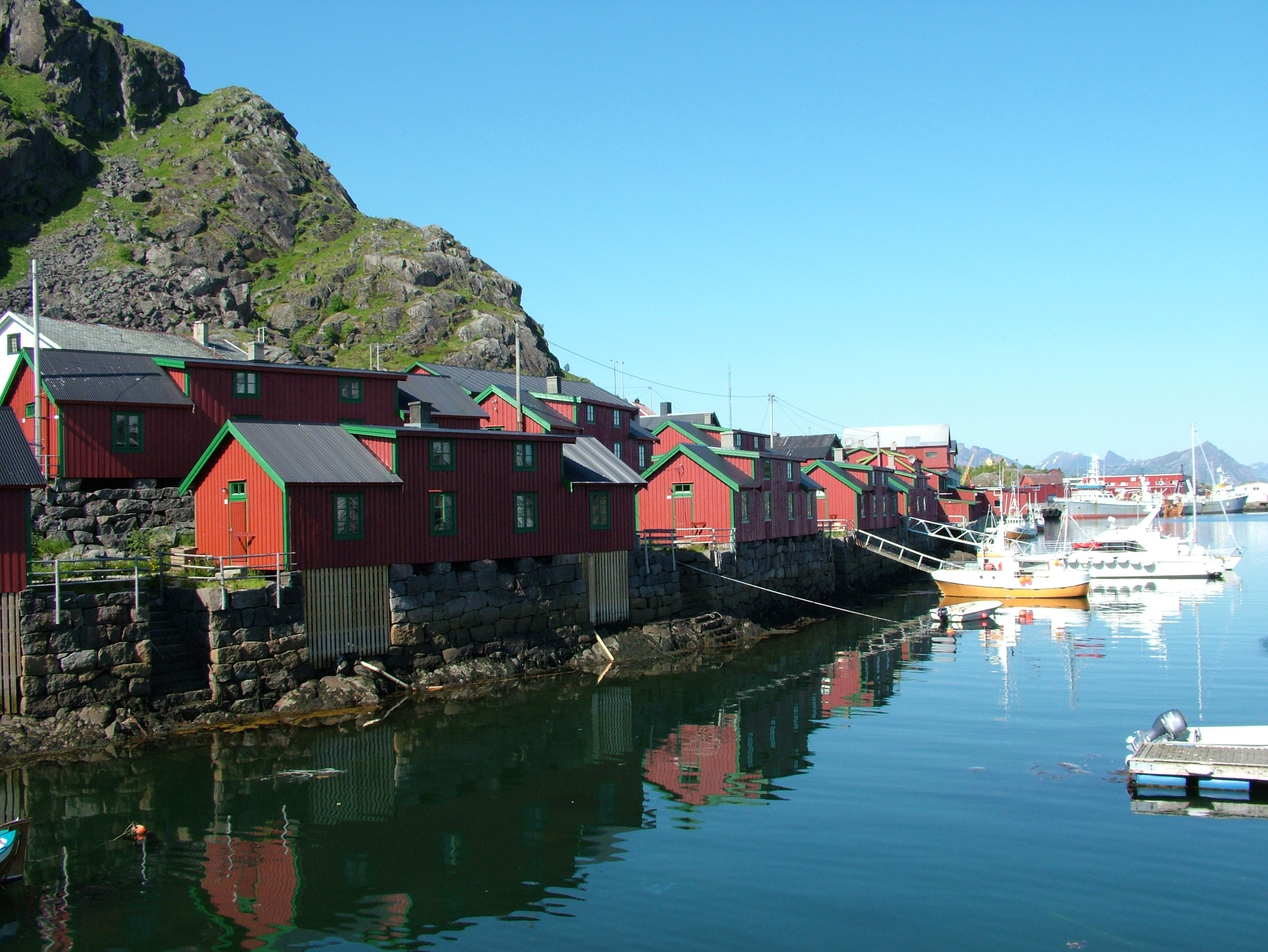 Der hafen in Stamsund Lofoten Norwegen. Selber fotografiert am 16.06.2005.